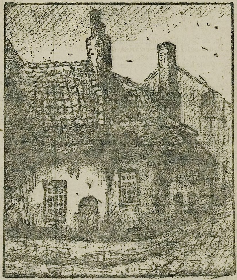 Een Hoekje van de Kat, tekening van FCG in De Volksstem